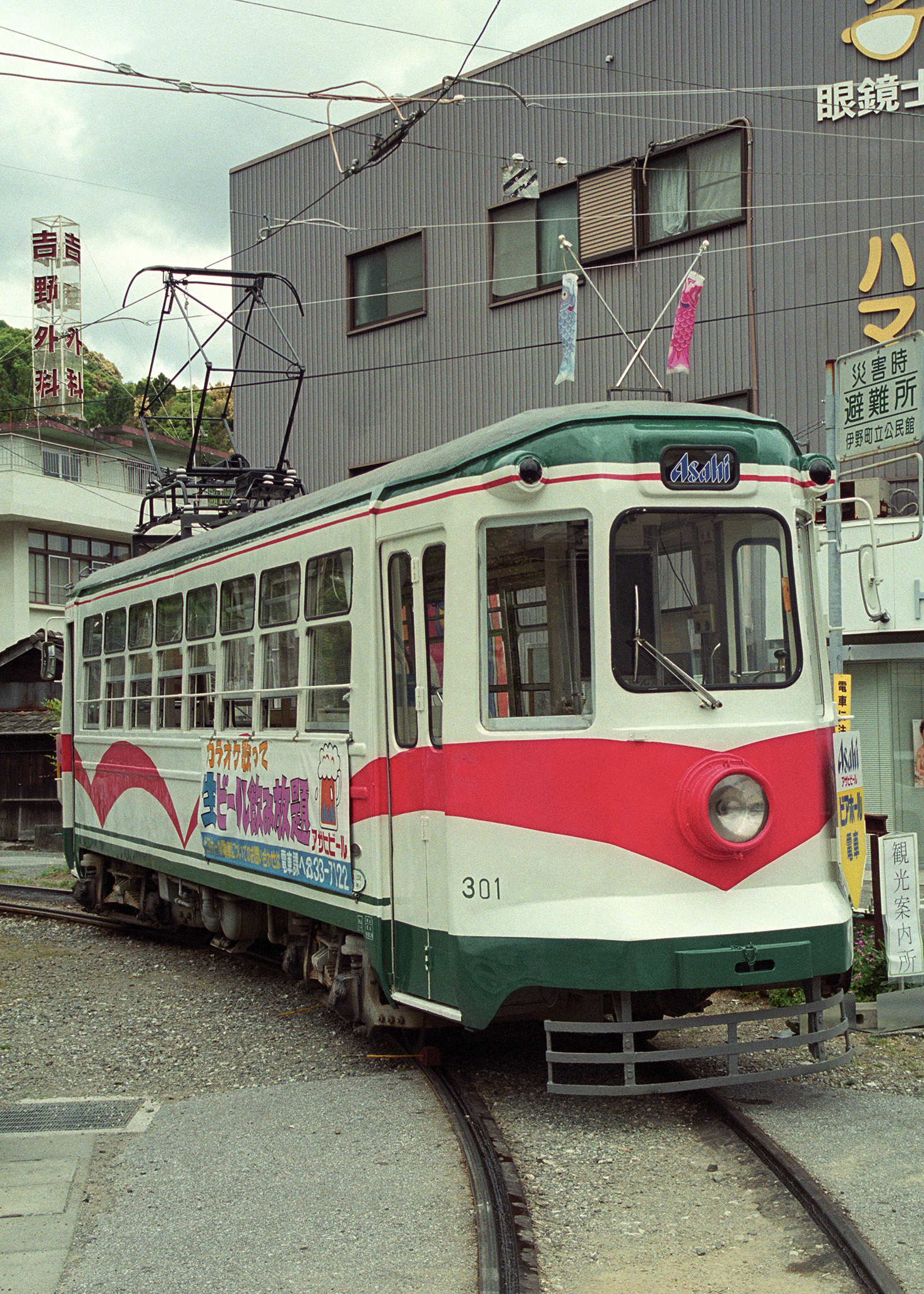 土佐電鉄300形301